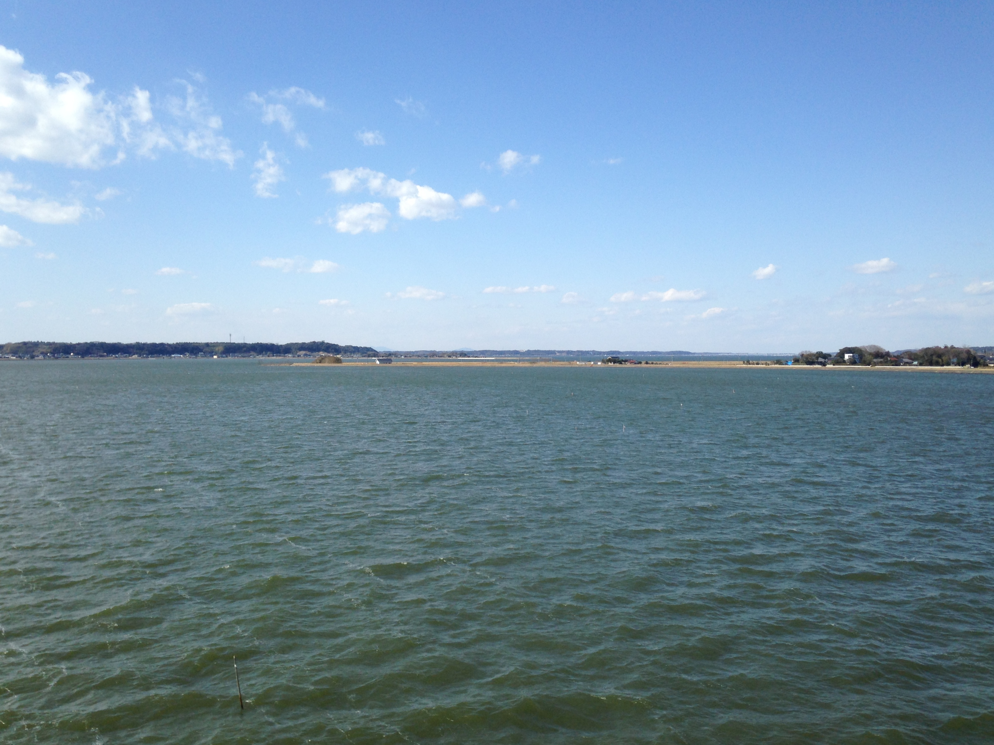 鹿島線列車より望む北浦(西側)